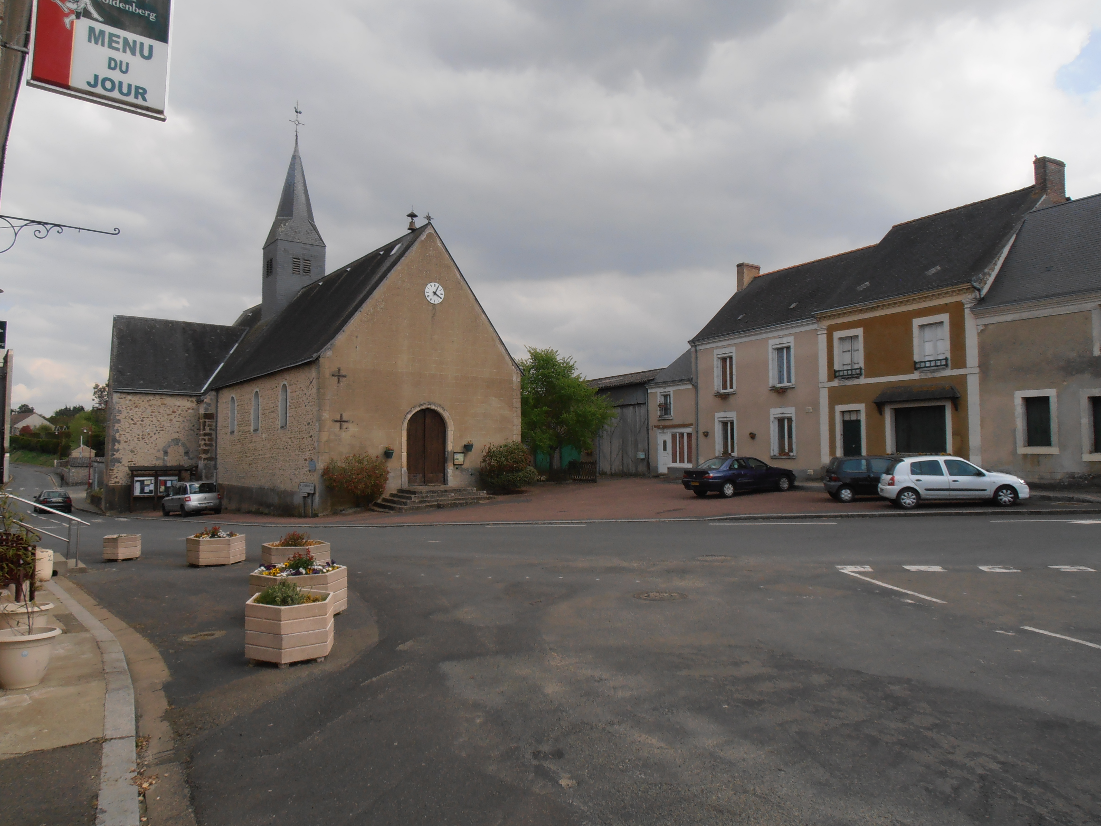 Le centre de Ligron